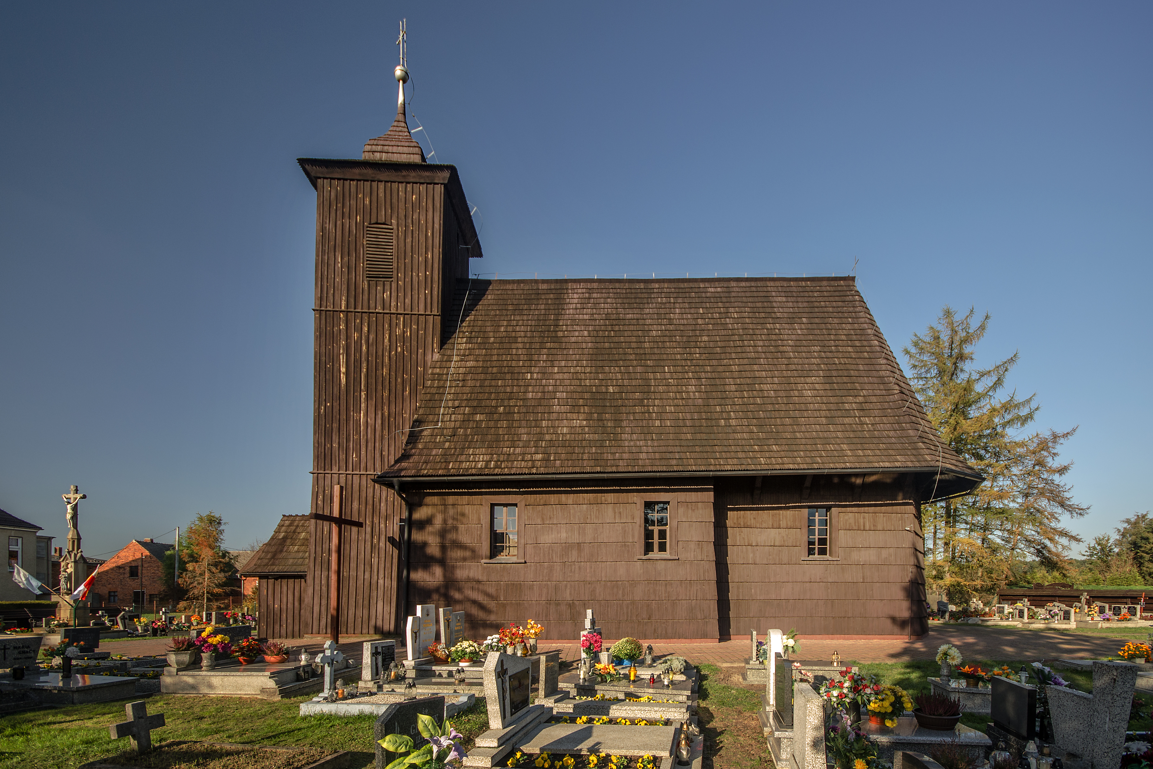 Lasowice Wielkie, kościół par. p.w. Wszystkich Świętych, 1599